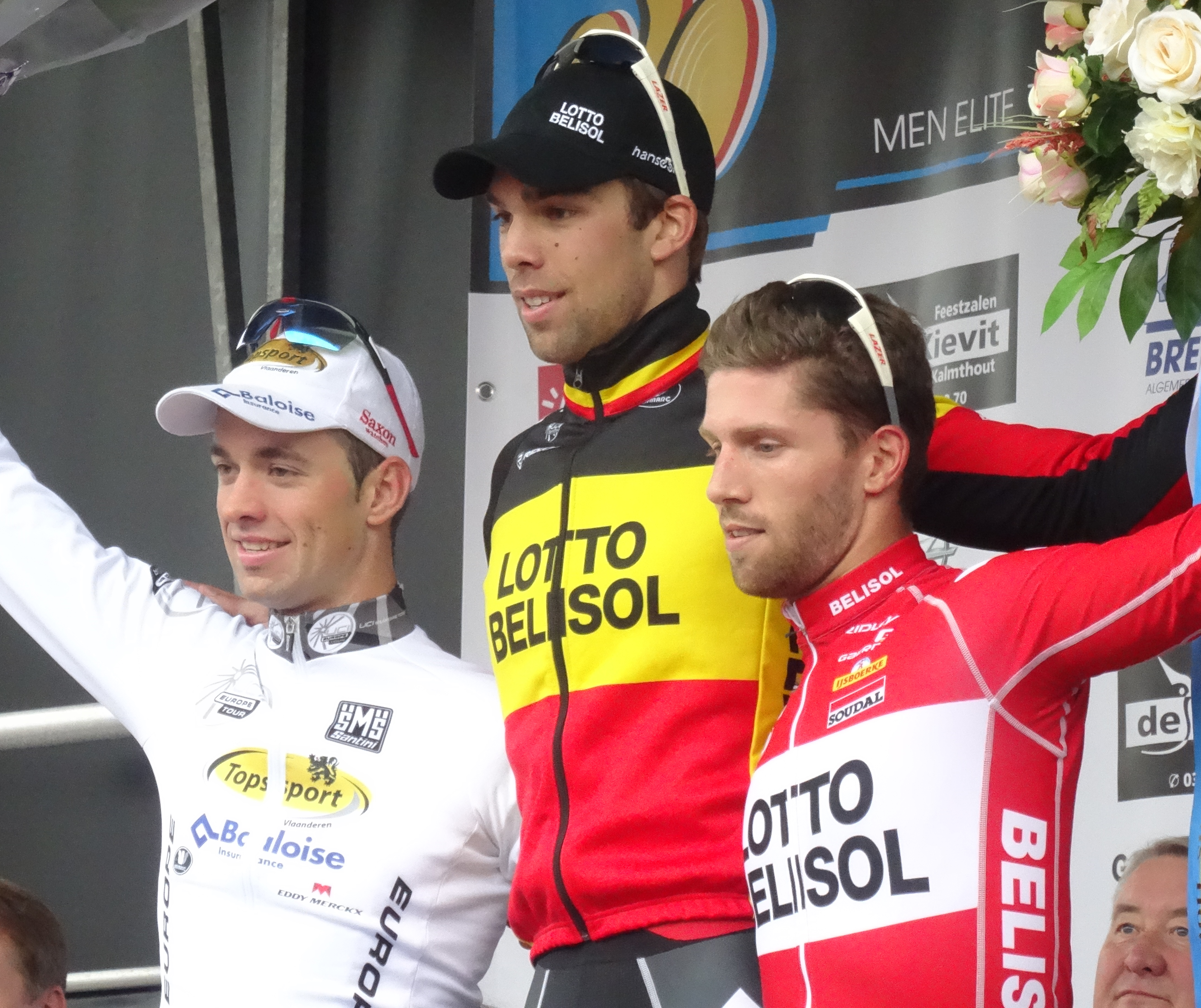 Reportage photographique réalisé le mardi 14 octobre à l'occasion du départ et de l'arrivée du Prix national de clôture 2014 à Putte (Woensdrecht, Pays-Bas) et Putte-Kapellen (Kapellen, Belgique).